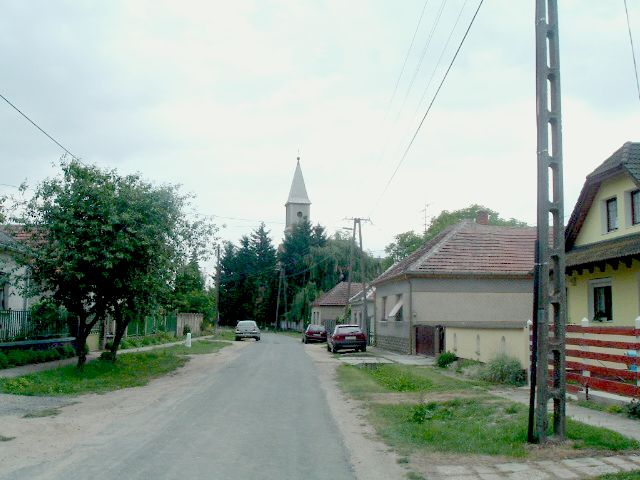 Bozzai, Hungary